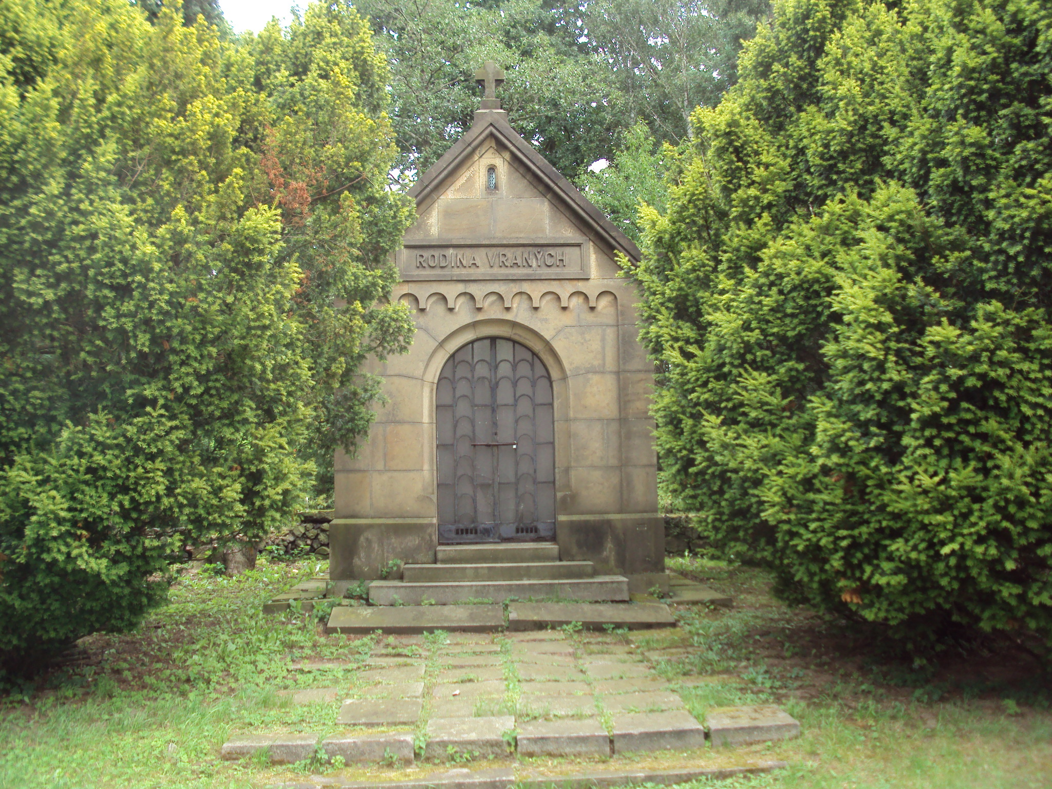 U kostela je kaple rodiny podnikatele Vraného